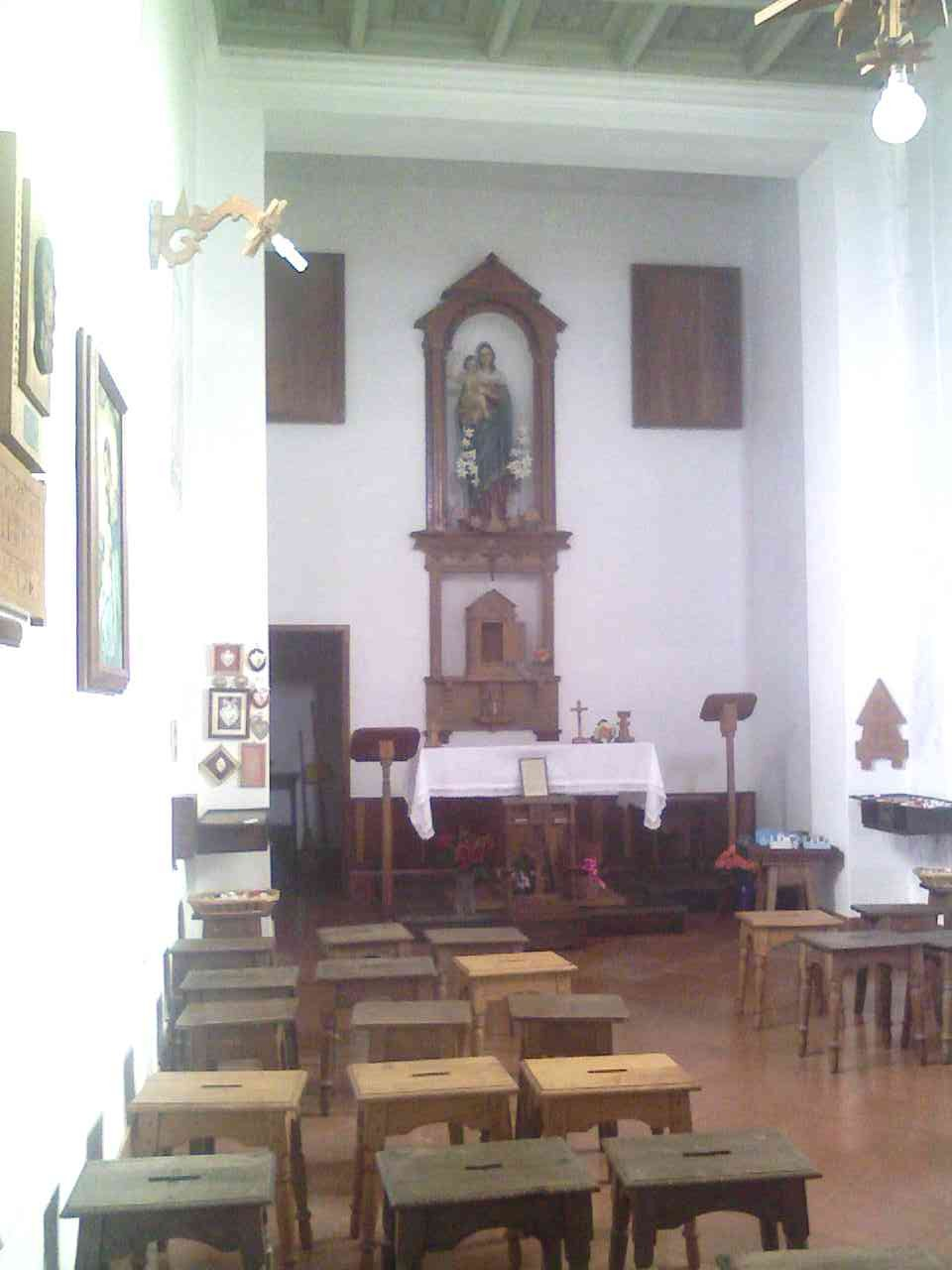 Interno della chiesetta Regina Pacis sul Monte Beigua (Italy)